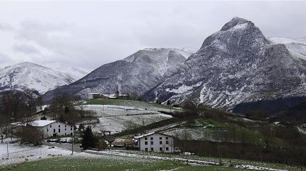 Gaintzako baserriak eta Txindoki mendia atzean.